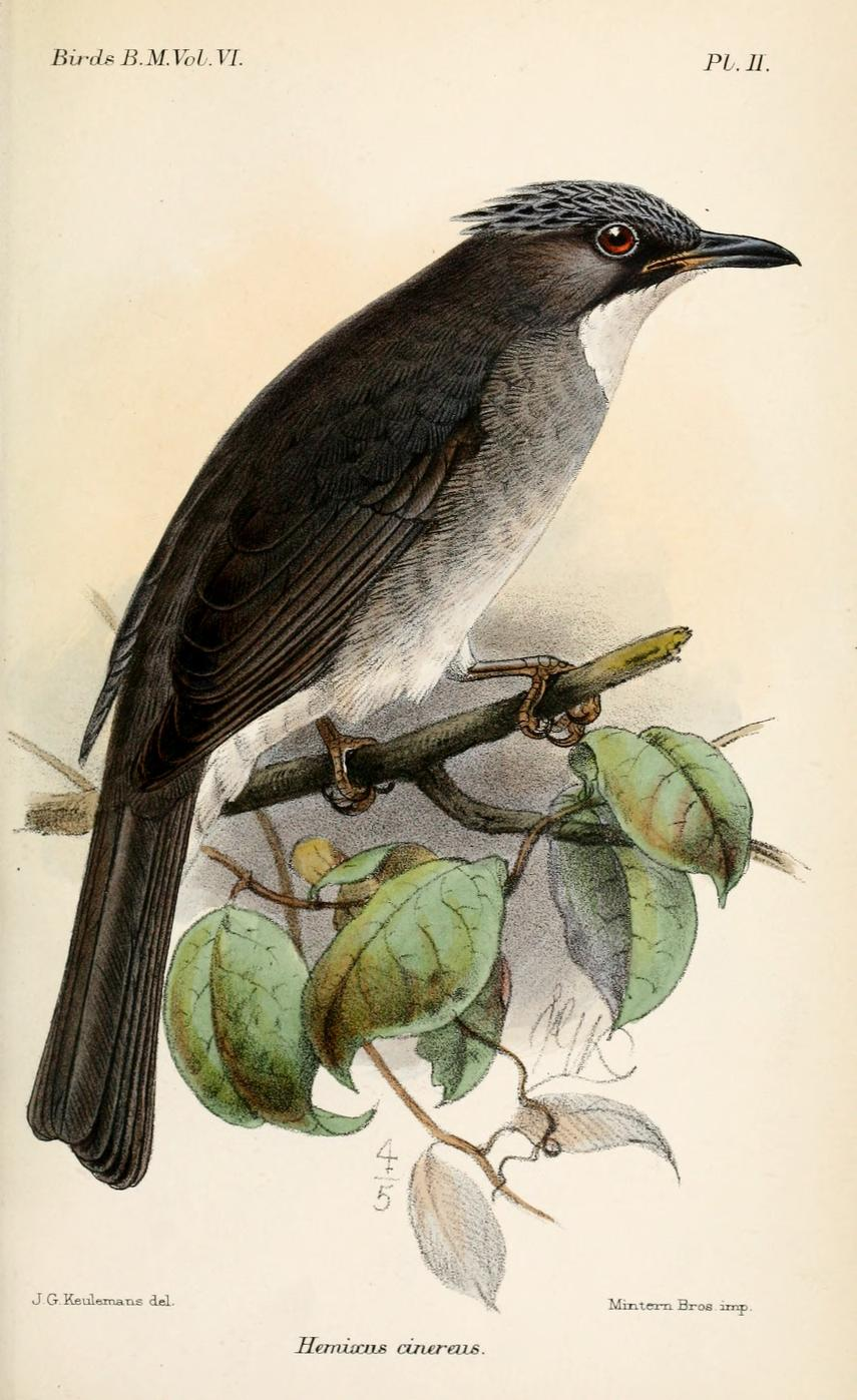 Hemixus cinereus = Hemixos flavala, Ashy Bulbul